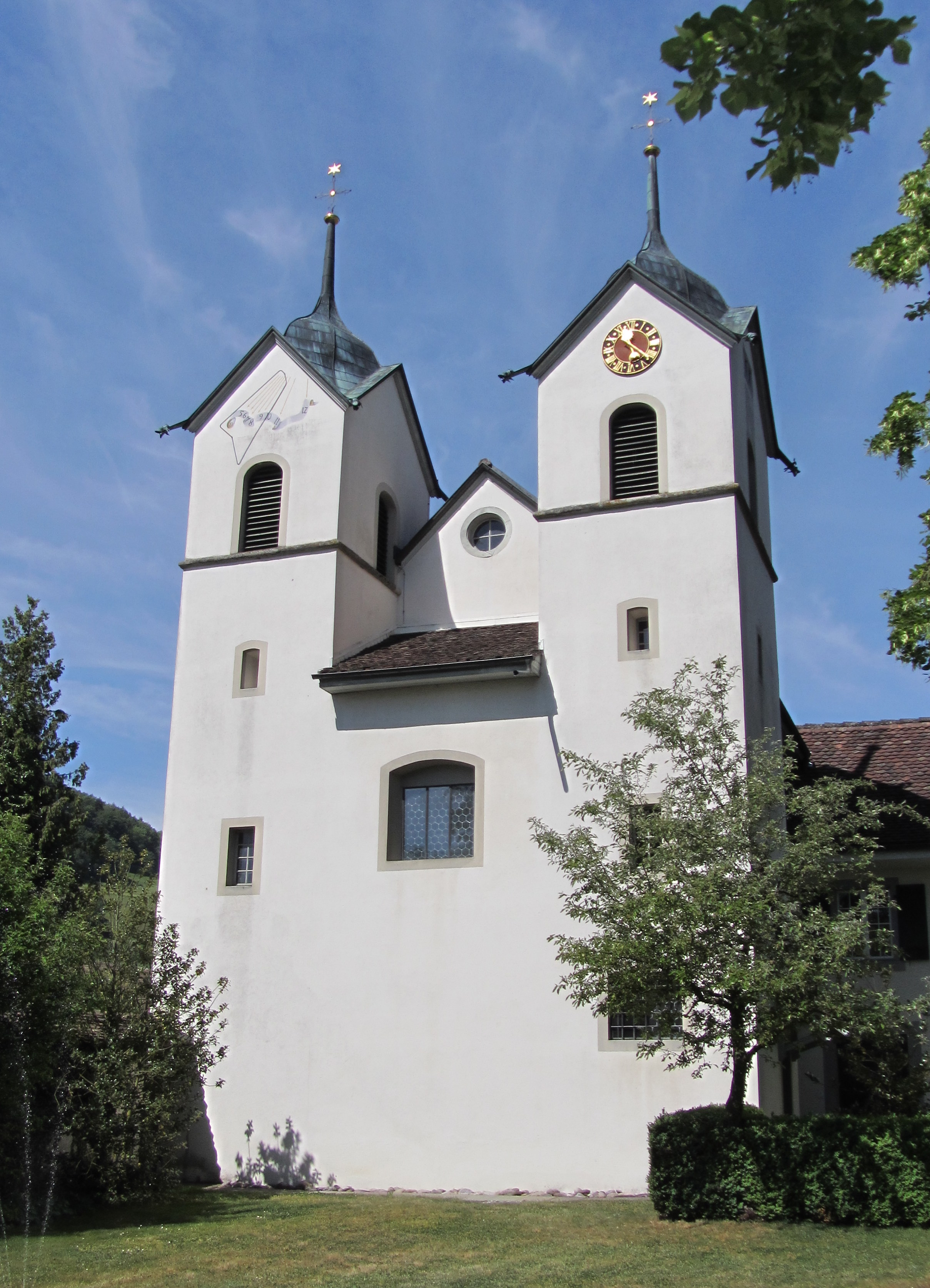 Chiesetta del castello di Böttstein